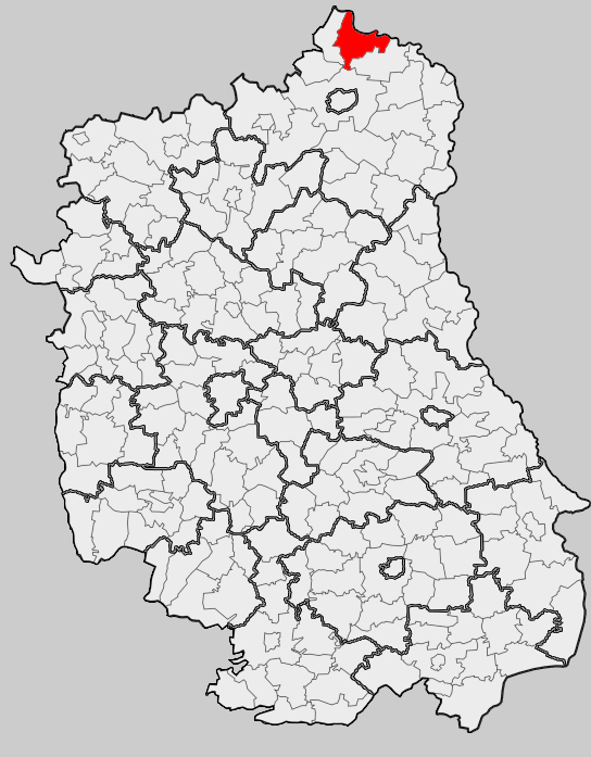 Map of gmina Janów Podlaski, Biała Podlaska county, Lublin voivodship Mapa gminy Janów Podlaski, powiat bialski, województwo lubelskie